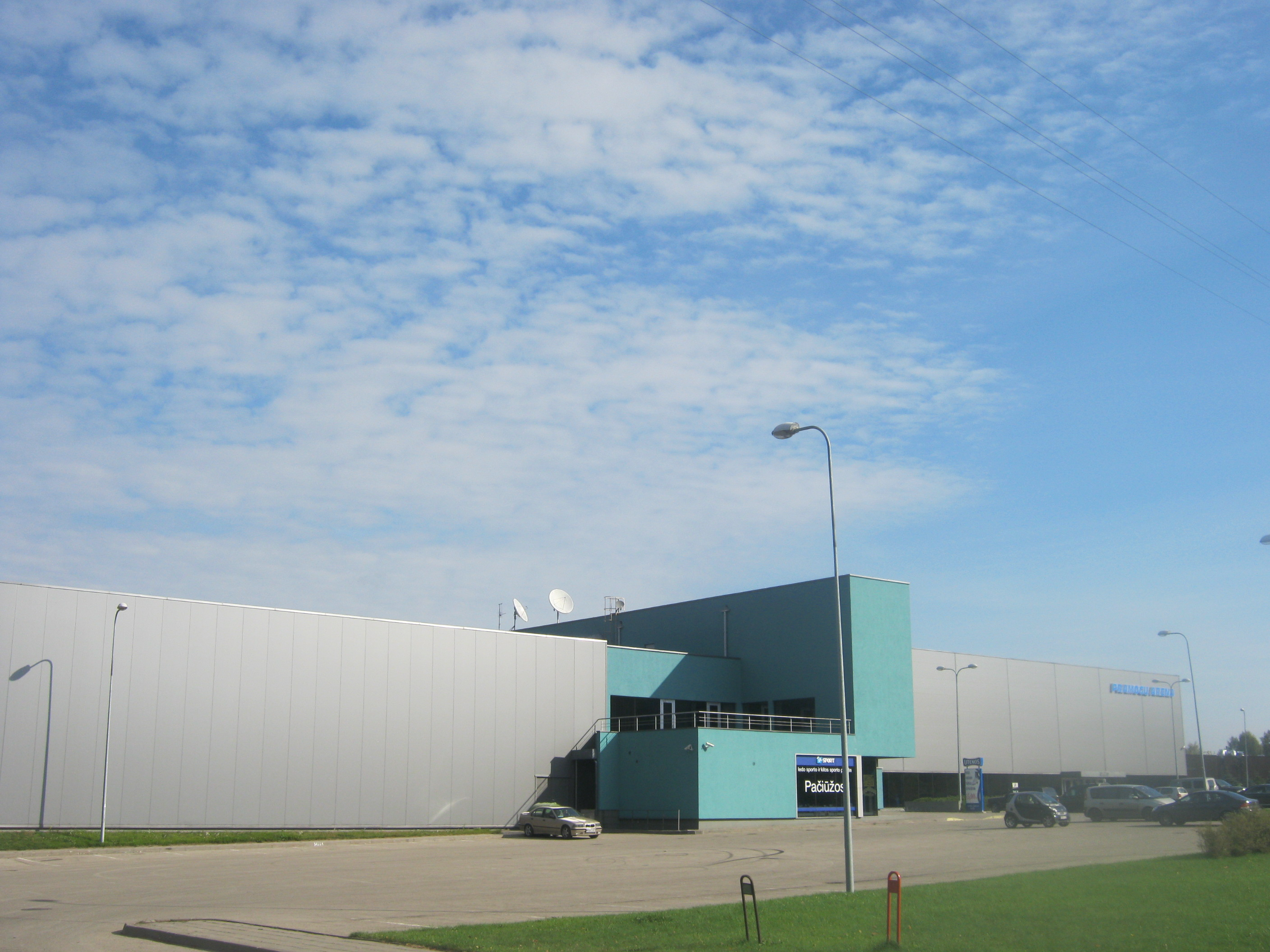 Pramogų arena